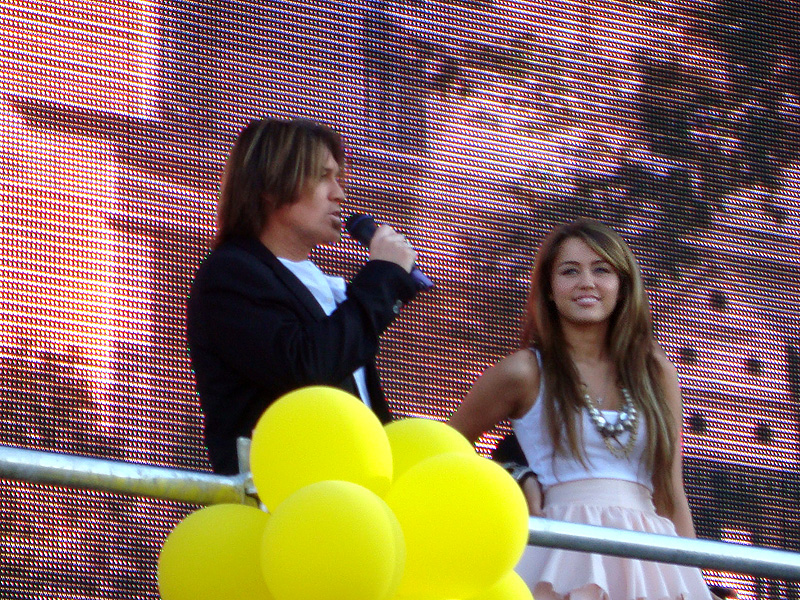 Miley Cyrus y Billy Ray Cyrus en la premiere de "Hannah Montana: La Película" en Madrid, España (2009).